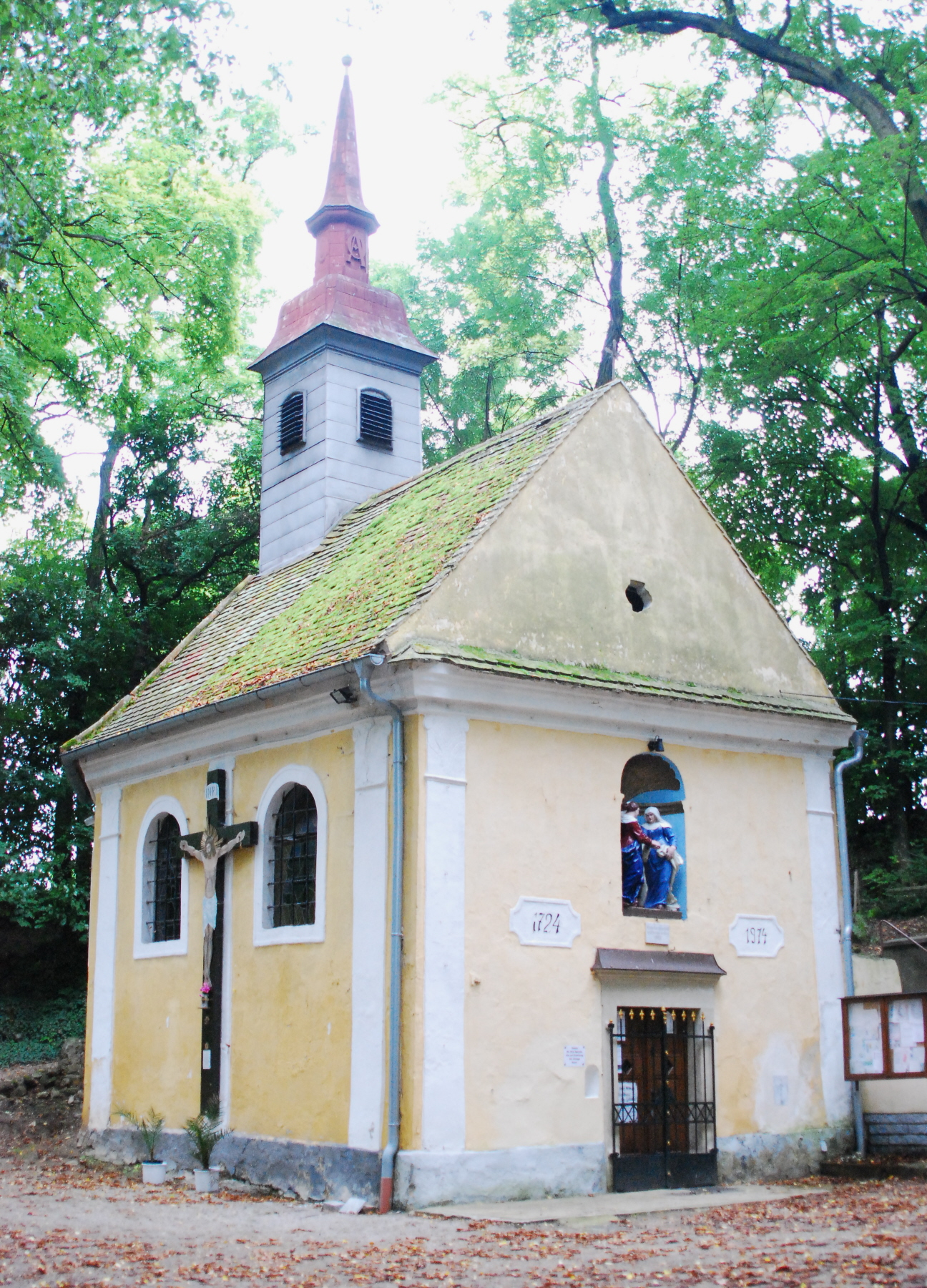 Kapelle beim Pulkauer Bründl in Niederösterreich